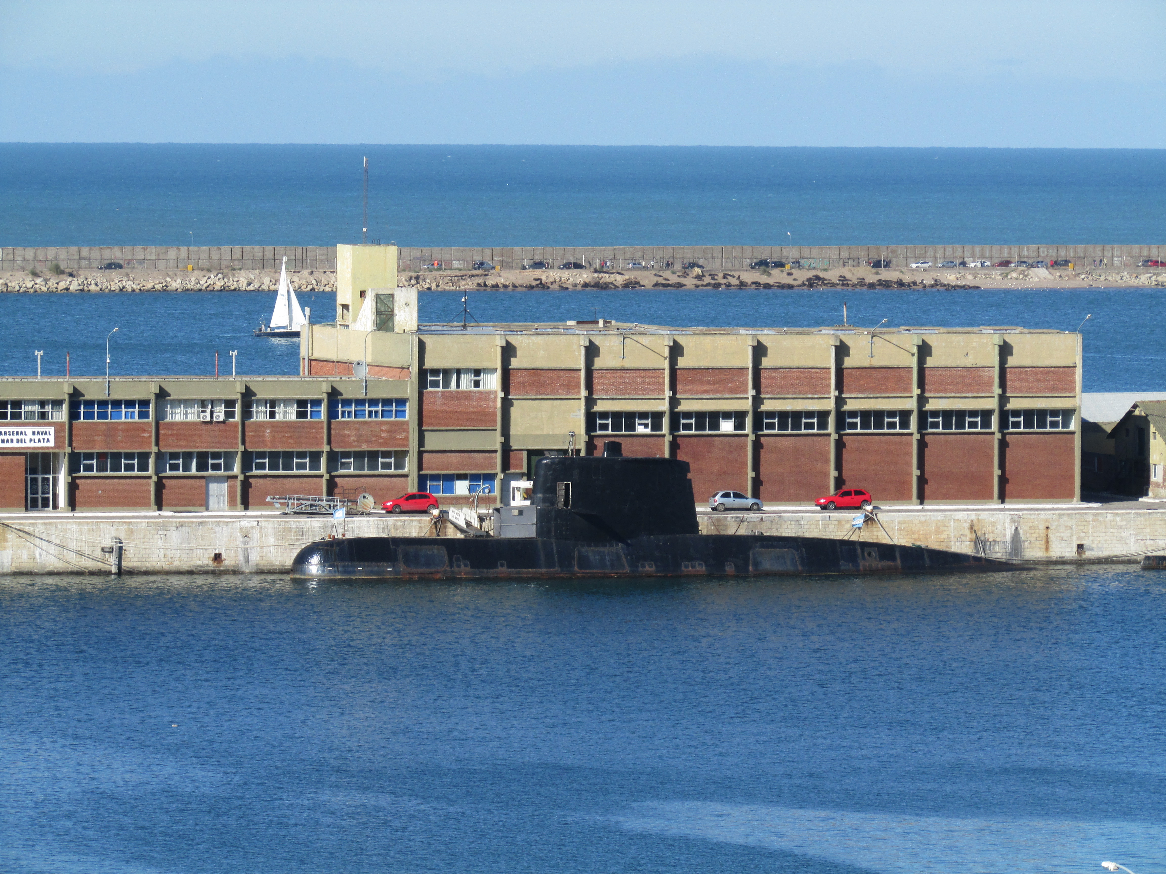 Submarino y edificio del arsenal naval en la base naval de Mar del Plata, provincia de Buenos Aires, Argentina.